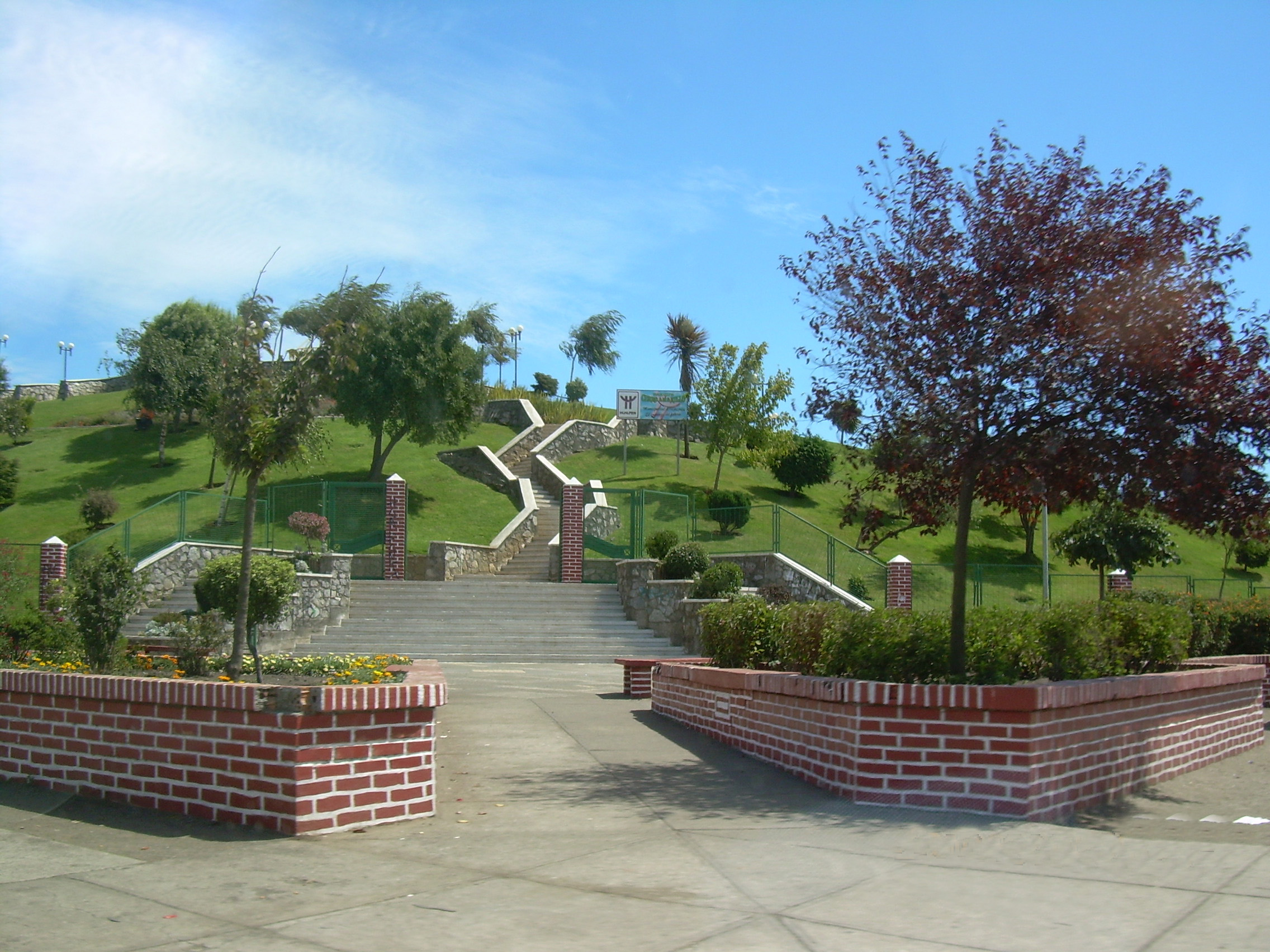 Foto del cerro amarillo, Hualpén, Chile.